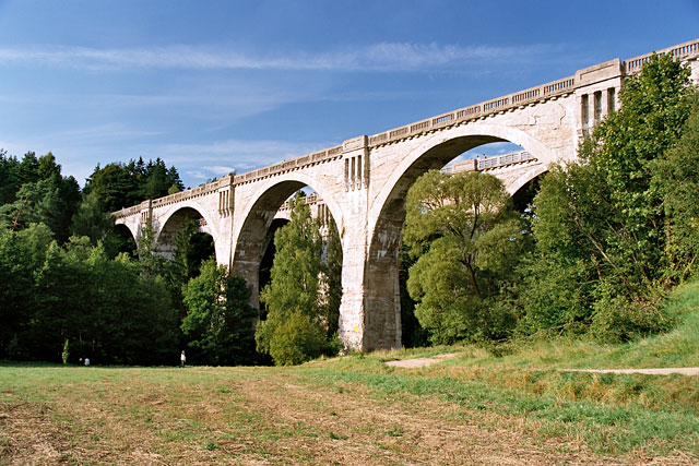 Wiadukty w Stańczykach na północy Suwalszczyzny. Zdjęcie: Przemysław Blueshade Idzkiewicz. Sierpień pl:2004. Te zabytkowe wiadukty wykorzystywane są przez miłośników sportów ekstremalnych do skoków bungee. Zdjęcie udostępnione na licencji cc-by-sa.